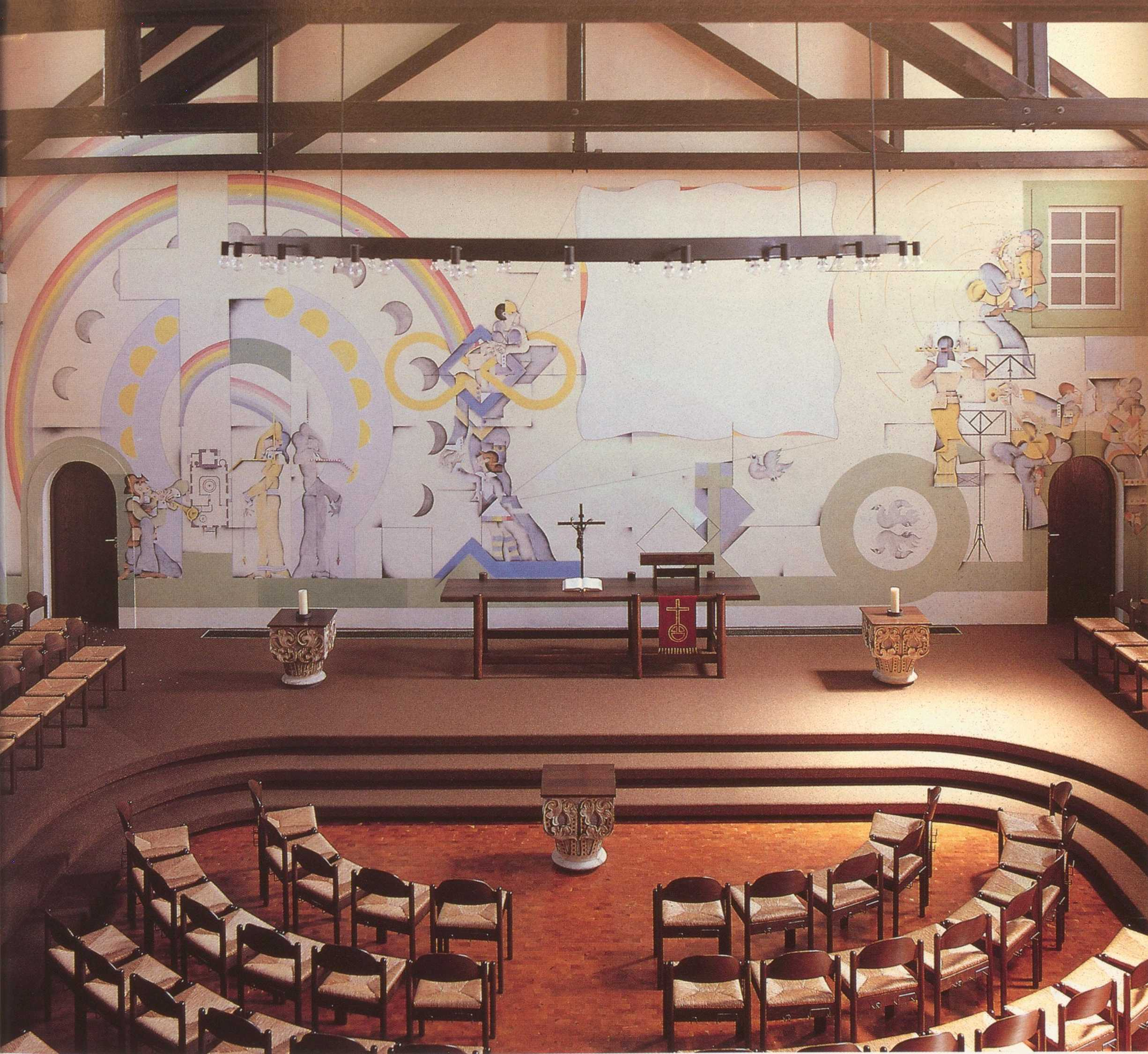 Wandbilder von Adam Lude Döring, Mineralfarbe, 1977/1978, Güglingen, Mauritiuskirche.